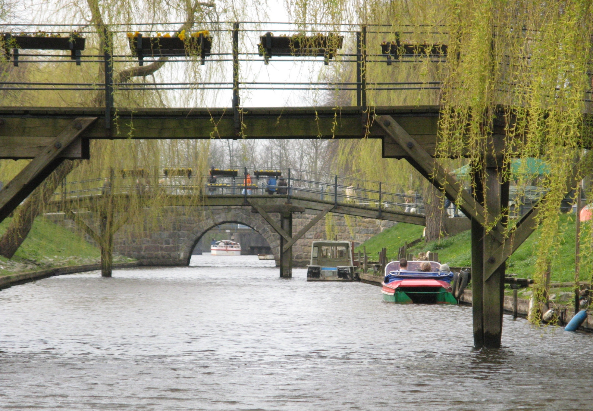 Brücken in Friedrichstadt Author: Dirk Ingo Franke